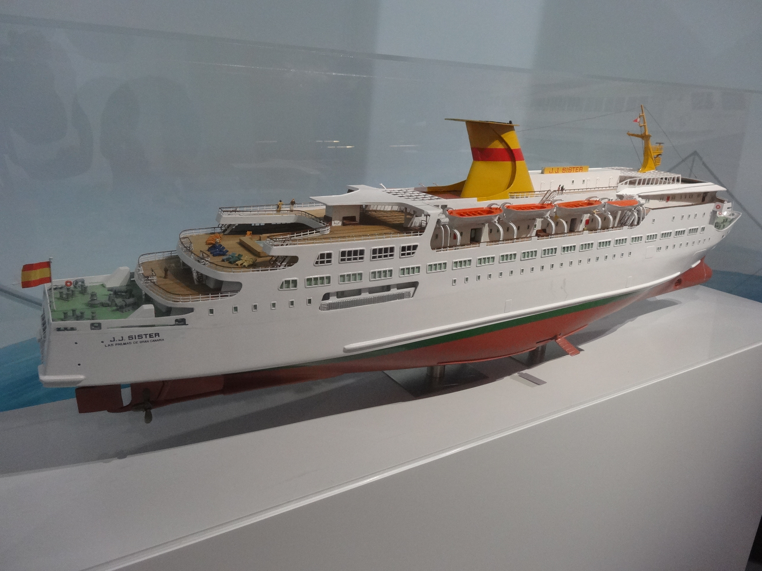 Museu Marítim de Barcelona. Exposició del centenari de Trasmediterránea, del 27 de gener i fins l'1 de maig de 2017, amb peces de les col·leccions de la Compañía Trasmediterránea i del Museu Marítim de Barcelona.